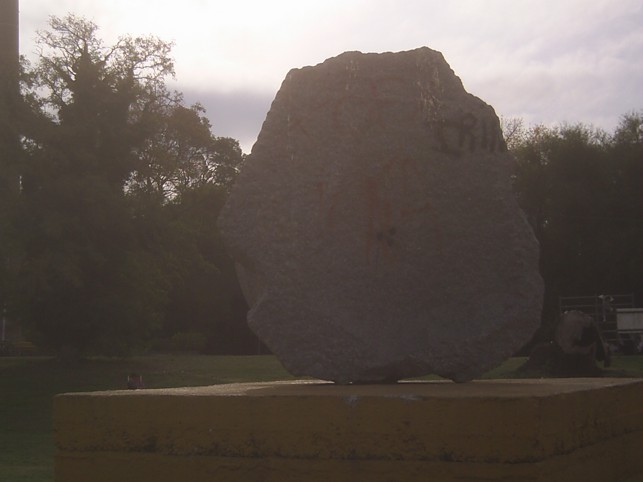 Muela del molino de Juan Fugl